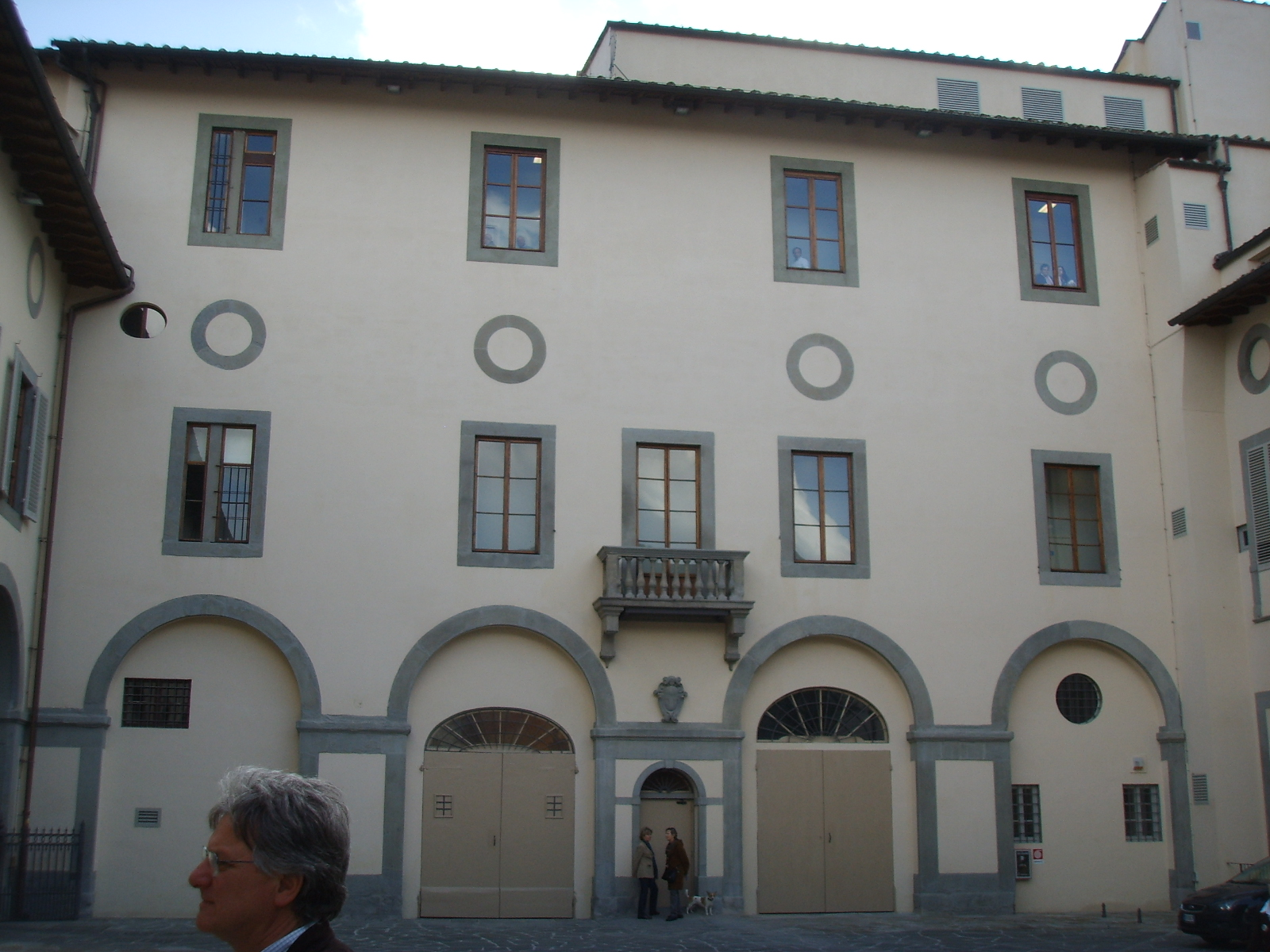 Palazzo sacrati, cortile